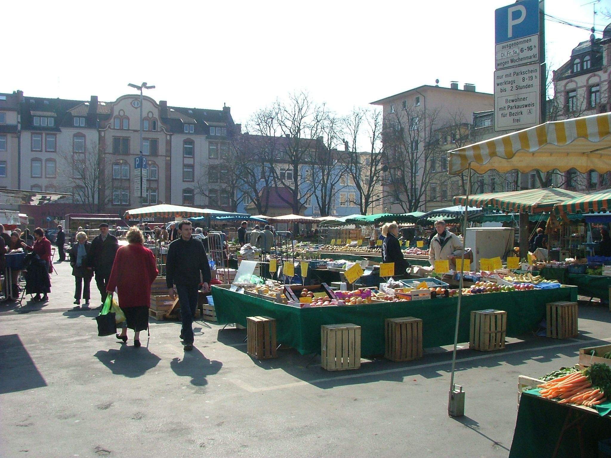 Wochenmarkt in Offenbach am Main